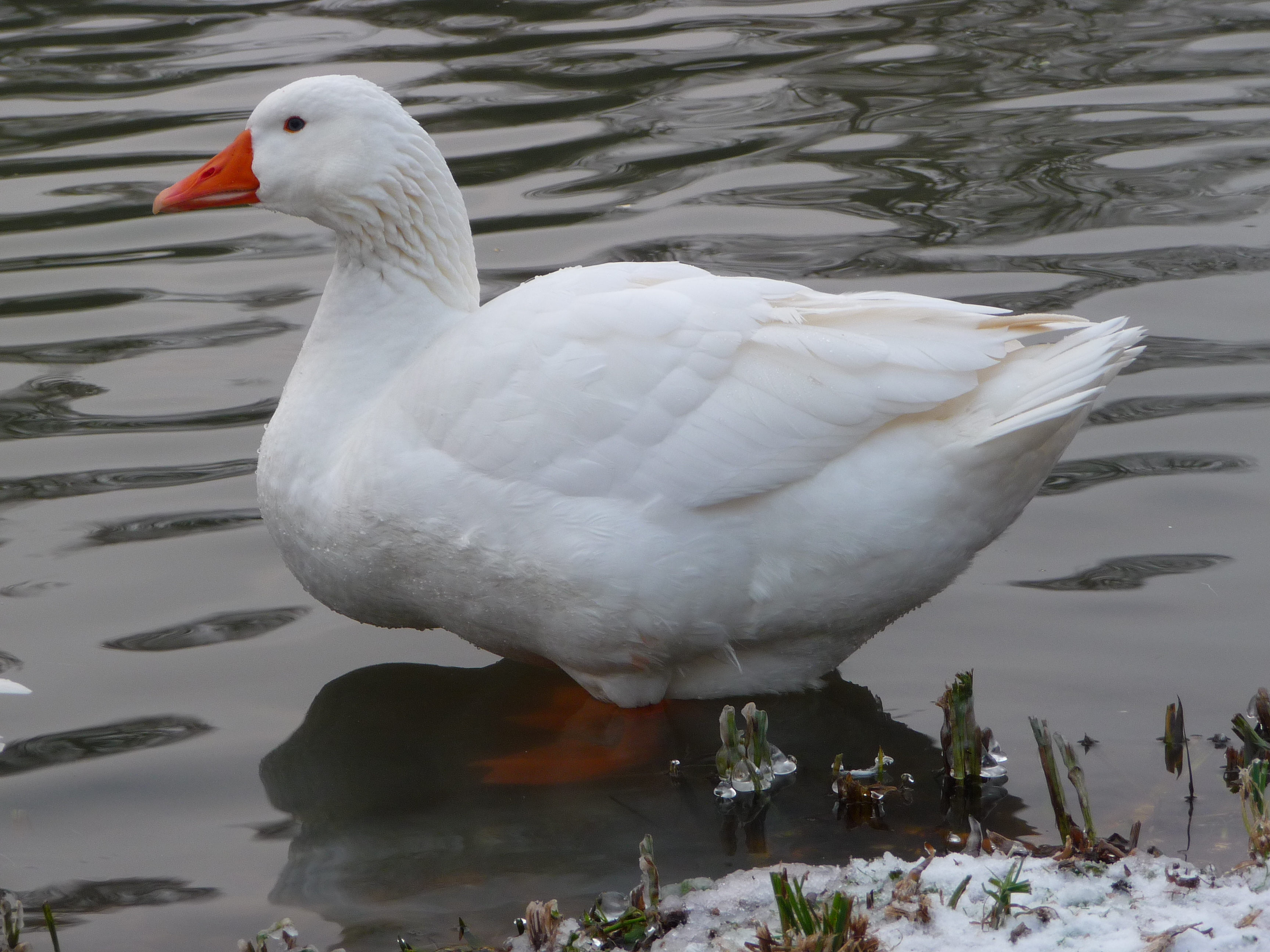 Hausgans (Emder Gans) bei einer Außentemperatur von -10 Grad Celsius, fotografiert in Schwetzingen (Baden-Württemberg, Deutschland))